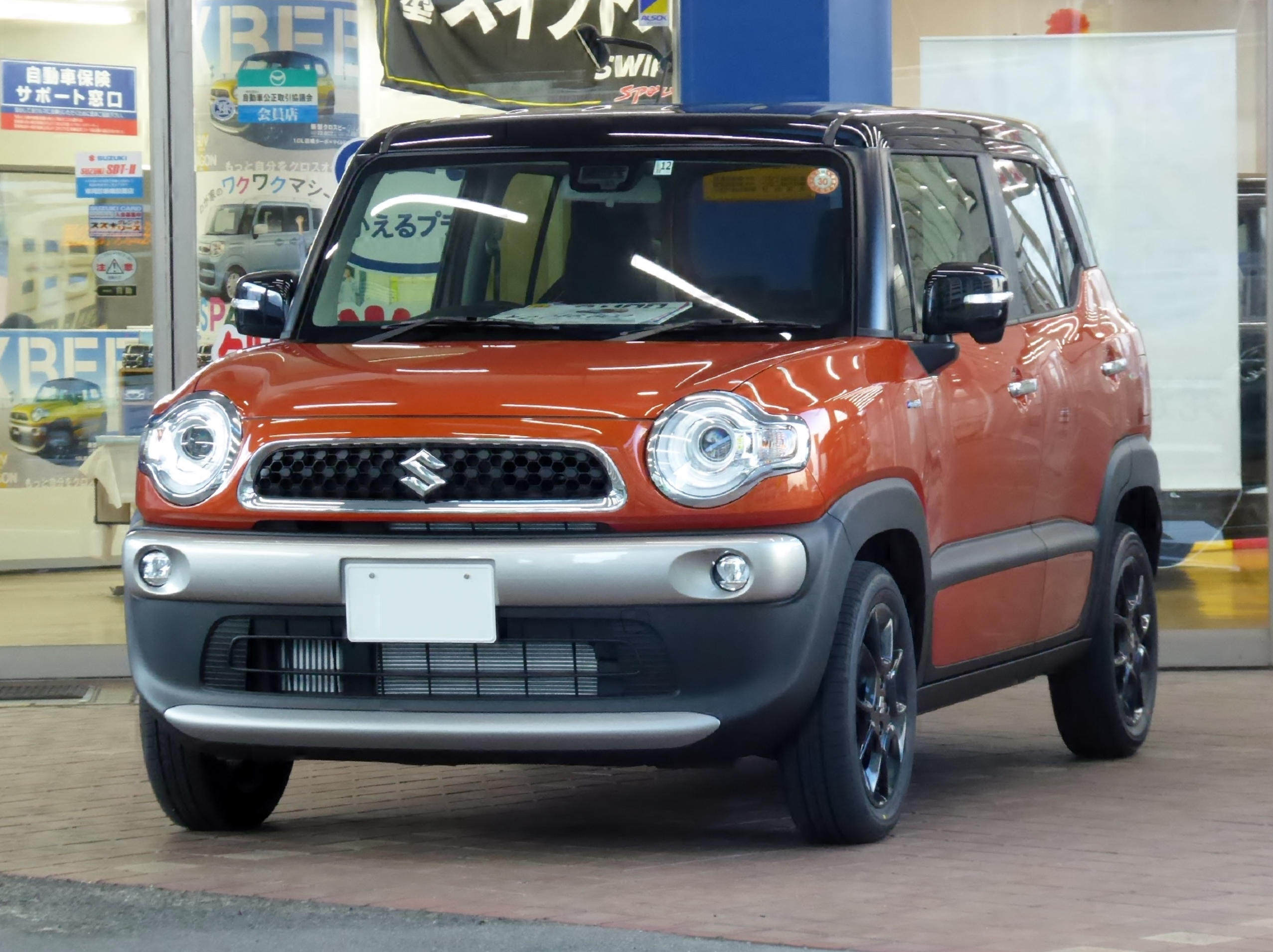 DAA-MB71S-CBZK-JC型スズキ・クロスビーHYBRID MZを撮影。